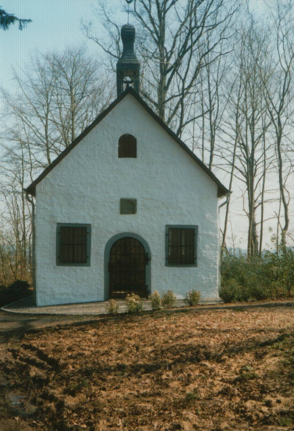 Johanneskapelle bei Lindlar-Vossbruch, um 1997